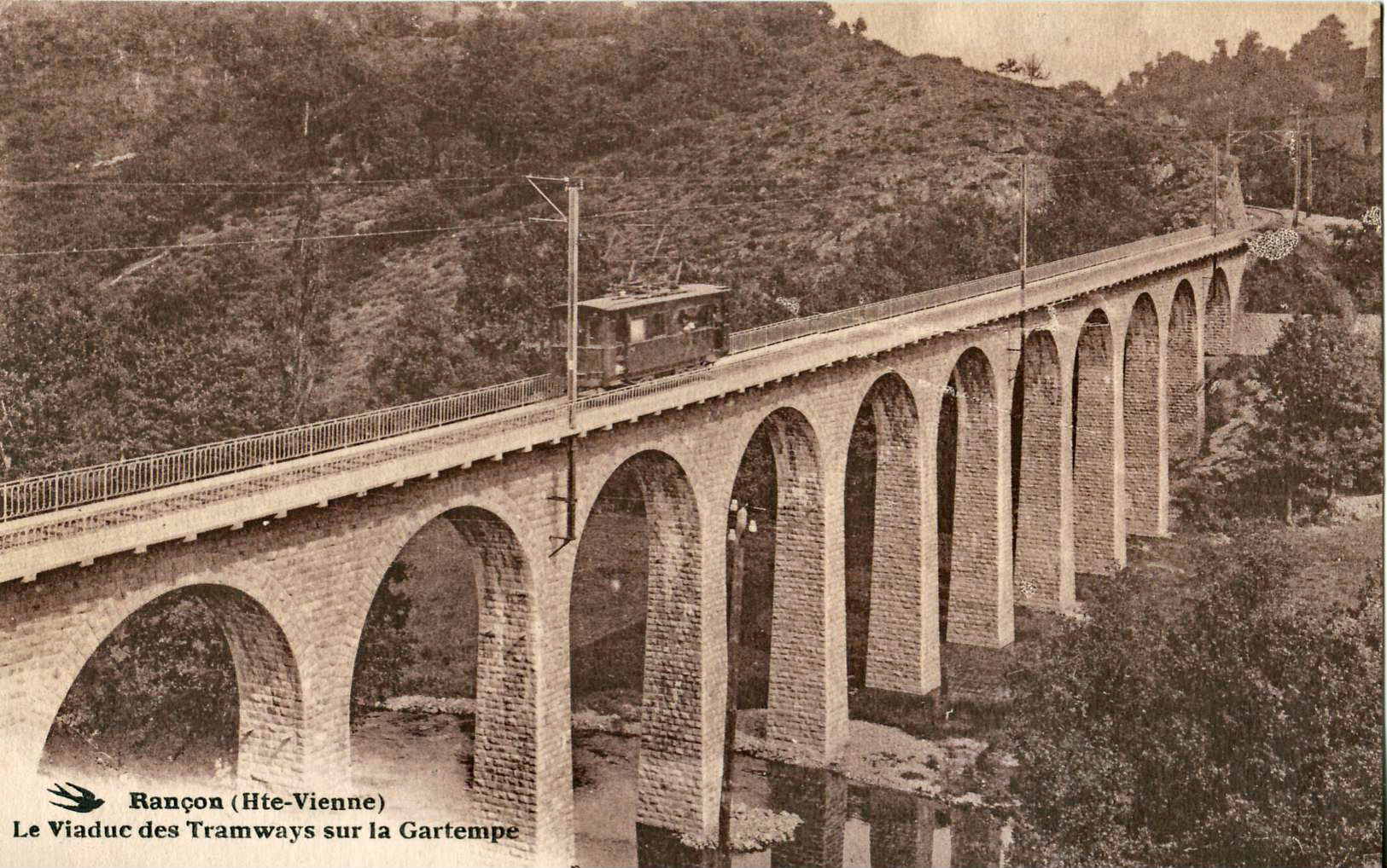 Carte postale ancienne au logo "Hirondelle" :RANCON - Le viaduc des Tramways sur la Gartempe (Chemins de fer départementaux de la Haute-Vienne)